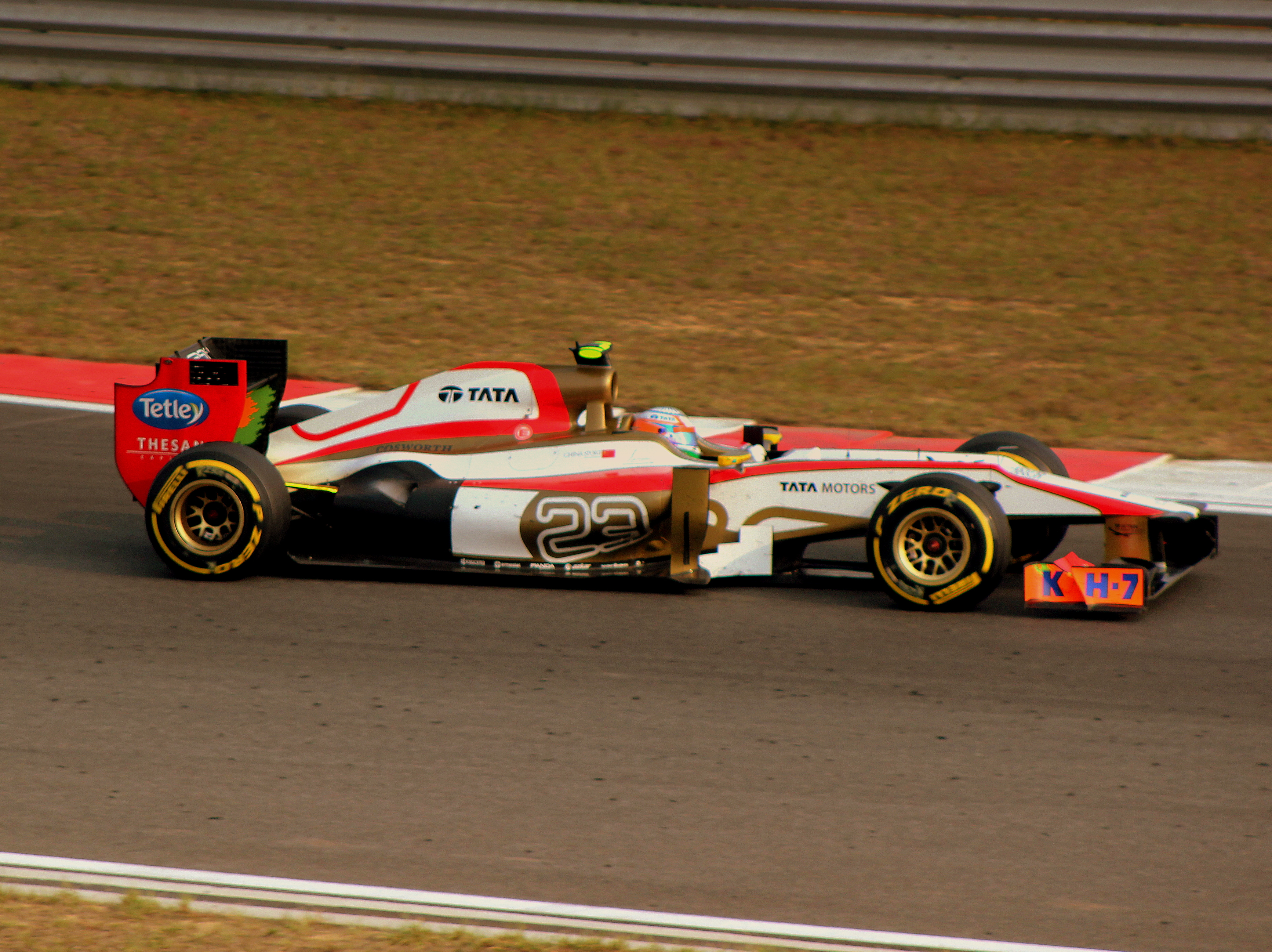 2012 YEONGAM GRAND PRIX SOUTH KOREA OCT